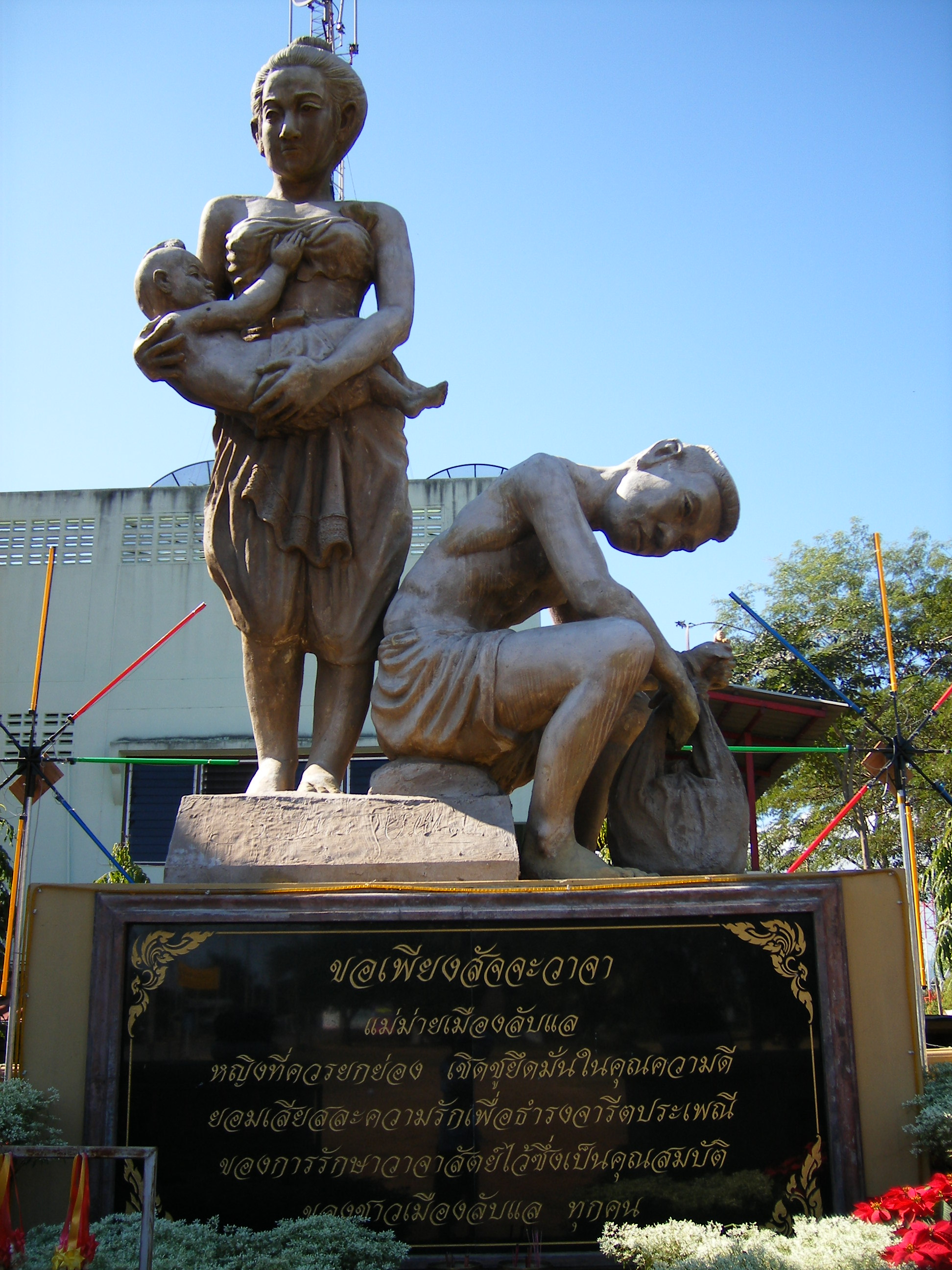 รูปปั้น แม่ม่ายเมืองลับแล (statue at Laplae city gate) (night)